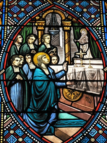 Vitrail (XIXe siècle) de la chapelle reliquaire - Pensionnat JB de La Salle - Rouen